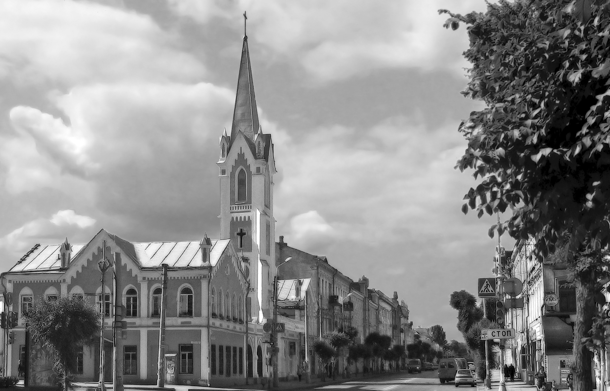 Самара, Лютеранский храм Святого Георга